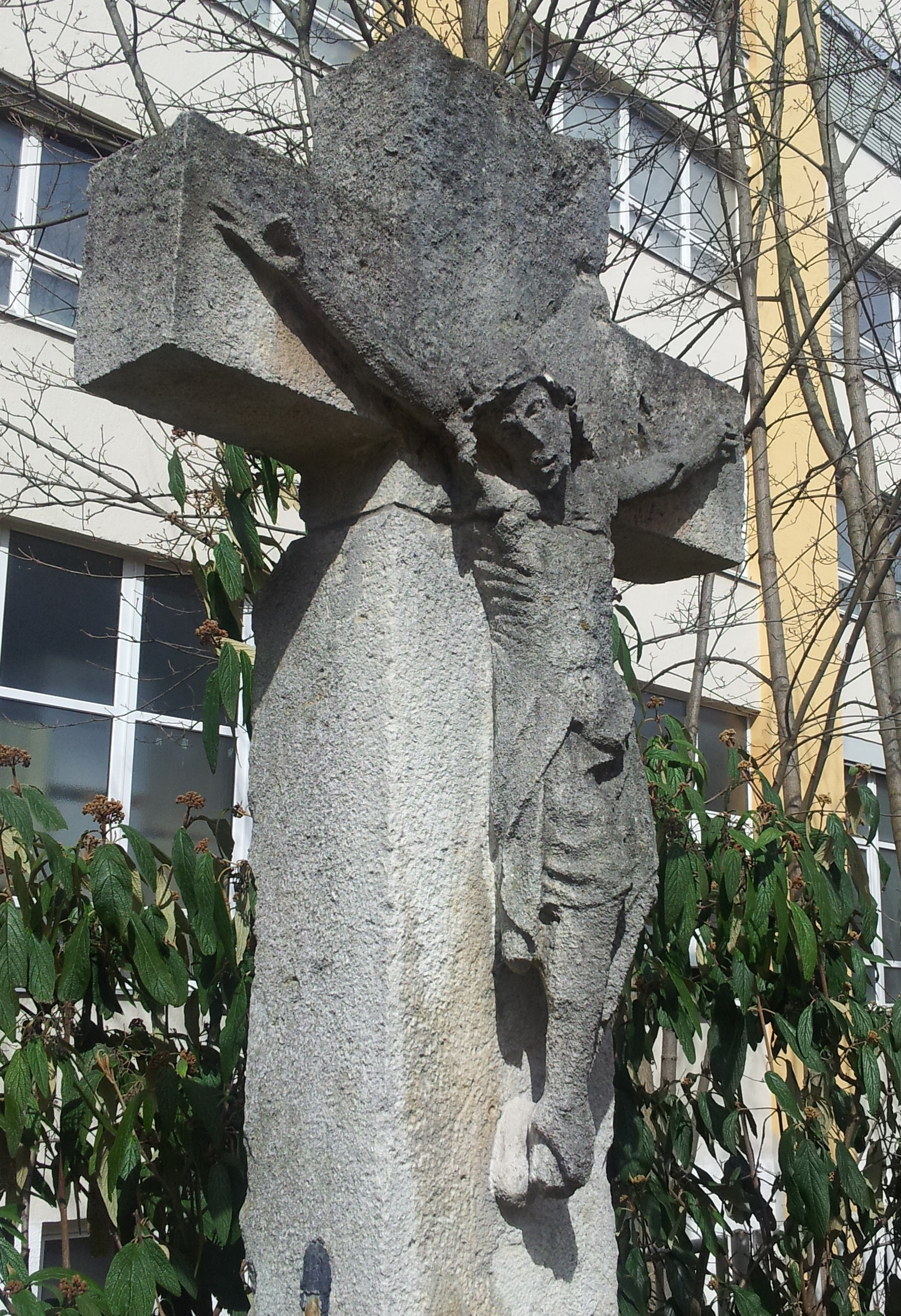 Der am Zantkreuz in Regensburg-Kumpfmühl angebrachte Korpus in einer Detailansicht.